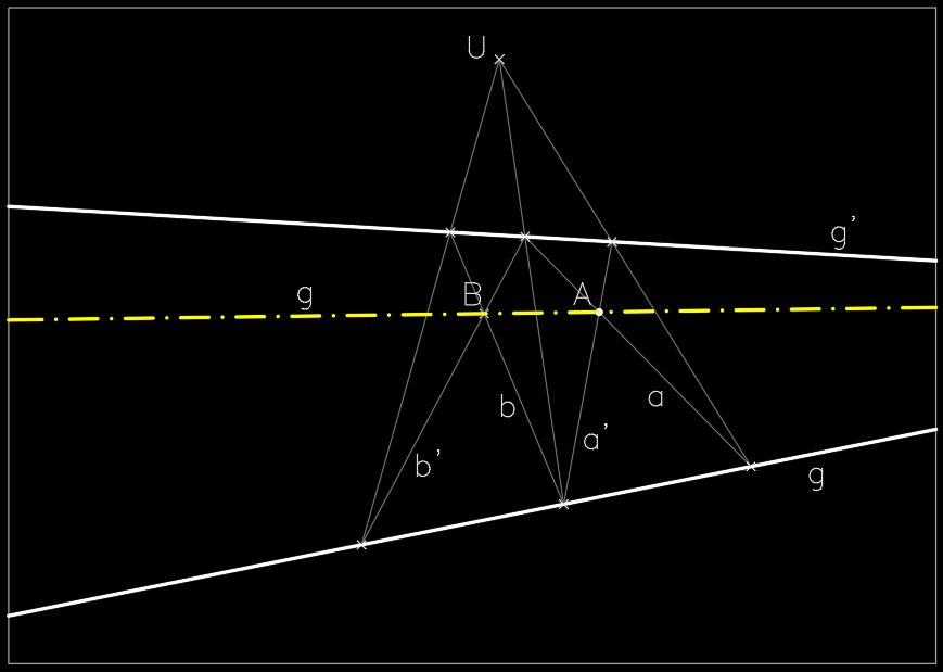 la soluzione di un problema abbastanza frequente nel disegno con riga e compasso si vuole costruire la retta passante per un punto A e per il punto d'incontro tra due altre rette g, g' supposto inaccessibile. Si tirino per A due rette a, a' e si considerino g, g'; a, a' come coppie di rette corrispondenti dì un sistema in involuzione; le rette ag, a'g'; a'g, ag' determinano il centro U di questa involuzione. Tirando dal quale una retta qualunque si individua un' altra coppia di rette corrispondenti b, b' il cui punto U' d'incontro sarà un punto dell'asse s, il quale dovendo passare per S e per l'incontro tra le rette gg' sarà la retta cercata. riferimento: Trattato di geometria descrittiva del dr. Guglielmo Fiedler By Wilhelm Fiedler حل مشكلة متكررة في الرسم التقليدي معلوم خطين ج، ج' ونقطة ا. مطلوب تحديد خط مستقيم بحيث يمر بنقطة معلومة أ وبنقطة يتعذر الوصول إليها، اي خارج ورقة الرسم.